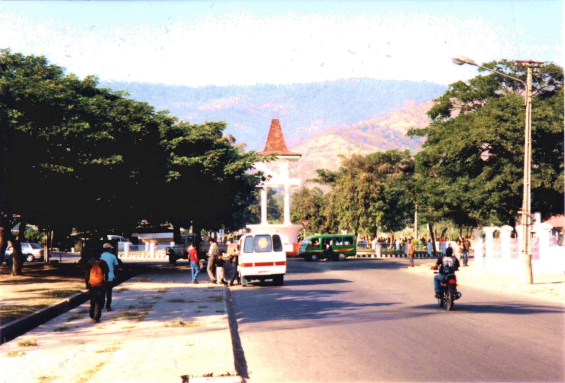 Der Kreisverkehr am Südende der heutigen Avenida Francisco do Amaral, damals in der mitte der Av. Bispo Medeiros.